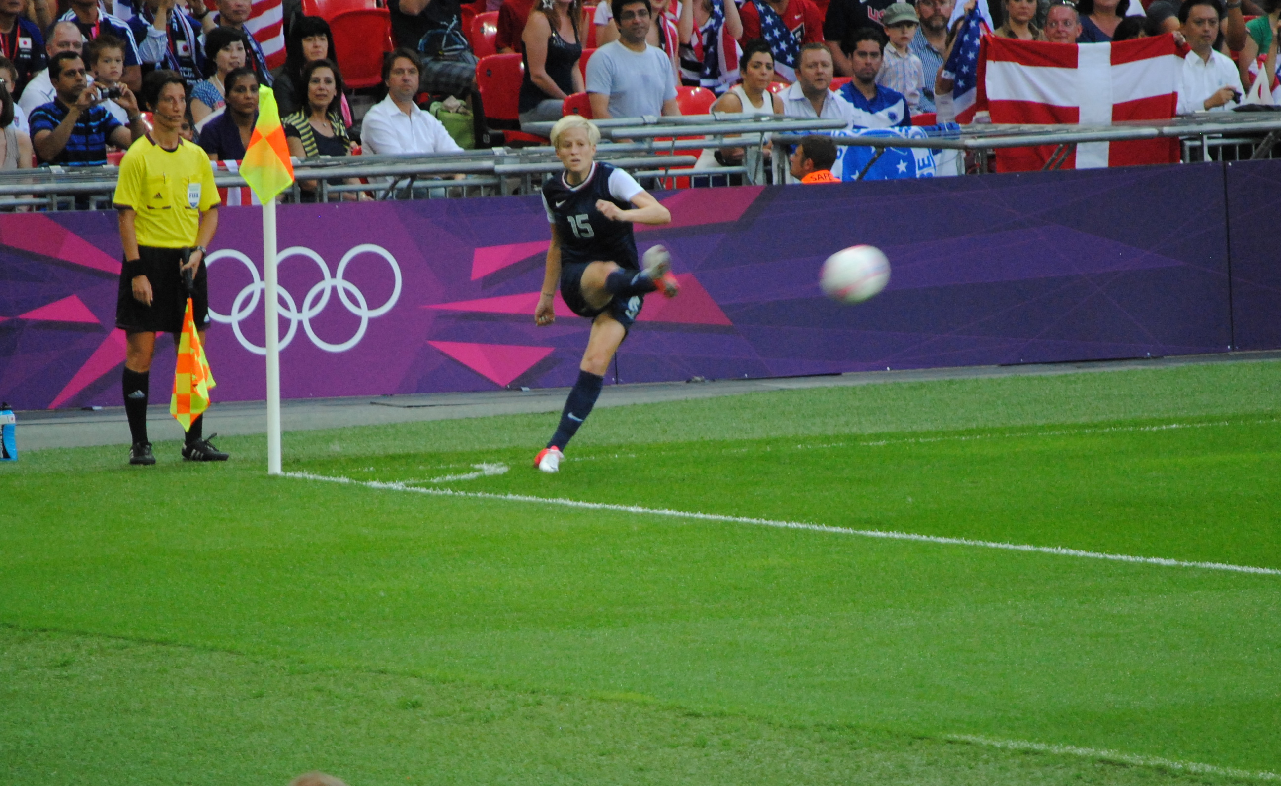 USA vs Japan